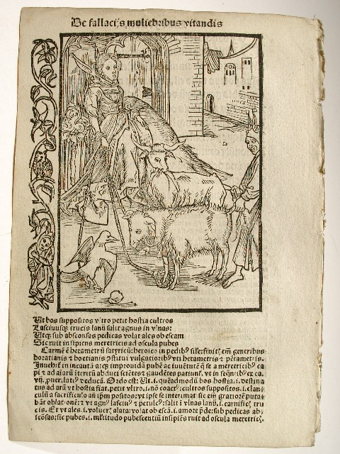 Holzschnitt von Albrecht Dürer auf einem Originalblatt der lateinischen Ausgabe des "Narrenschiffs" von 1506/07 mit der frühesten Druck-Darstellung einer Prostituierten. Holzschnitt: 8,4 x 11,6 cm, Blattgröße: 12,8 x 18,2 cm Navis stultifera a domino sebastiano Brant primum edificata. (VD B 7078/9). Blatt xlvi mit einem Original Holzschnitt von Albrecht Dürer. (Prestel 266, 31). Basel, Nikolaus Lamparter, 1506/07. Sebastian Brant hat dem Holzschnitt Dürers das Motto Wollust durch Einfalt manchen fällt manchen sie auch am Flügel hält, viel haben drin ihr End gewählt vorangestellt.